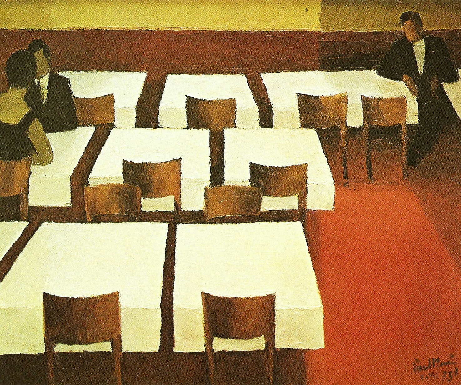 Les tables par le peintre suisse Paul Monnier, 54 x 65cm, huile sur toile.